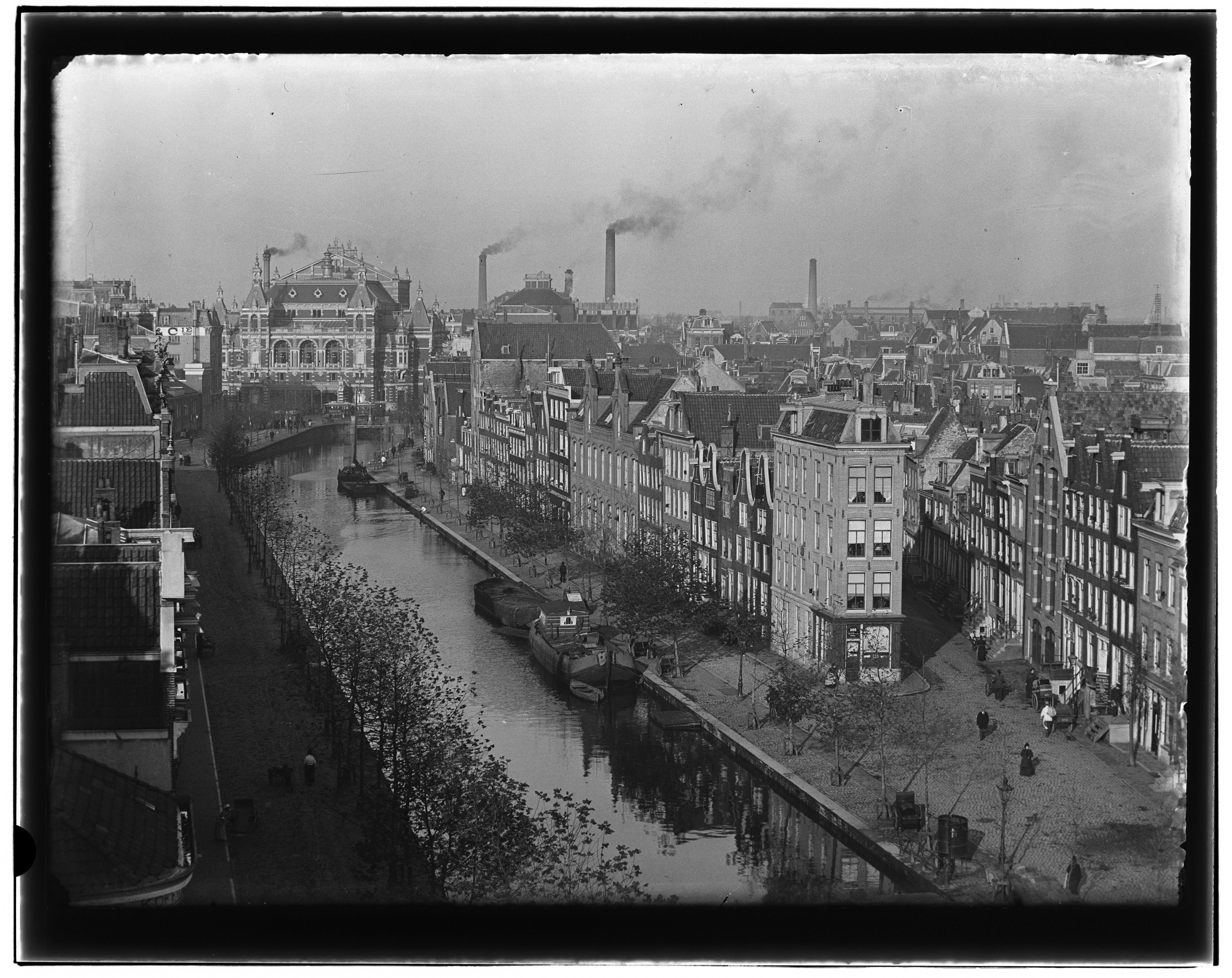 Beschrijving Lijnbaansgracht 247 t/m 286 (v.l.n.r.``, rechts) Vogelvlucht``, gezien vanaf de Melkinrichting van de O.V.V. (Onderlingevereeniging van Veehouders``, Weteringschans 81-89) naar de Stadsschouwburg``, Leidseplein 26. Rechts is de ingang van de Korte Leidsedwarsstraat. Links is de Zieseniskade. Documenttype foto Vervaardiger Olie``, Jacob (1834-1905) Collectie Collectie Jacob Olie Jbz. Datering 6 november 1894 Geografische naam Lijnbaansgracht Inventarissen Afbeeldingsbestand 10019A000722 Generated with Dememorixer